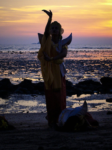 Ulek Mayang dance